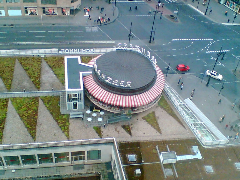 Café Kranzler am Kudamm von oben, Berlin.